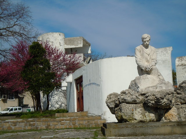 Фото автора. Выполнено в мае 2011 года.